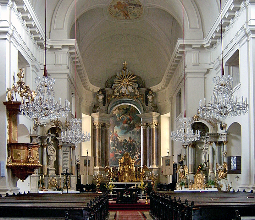 Pfarrkirche Grossweikersdorf. Innenansicht.